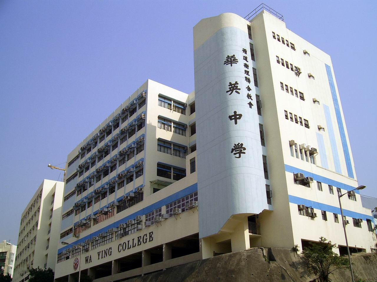 香港華英中學